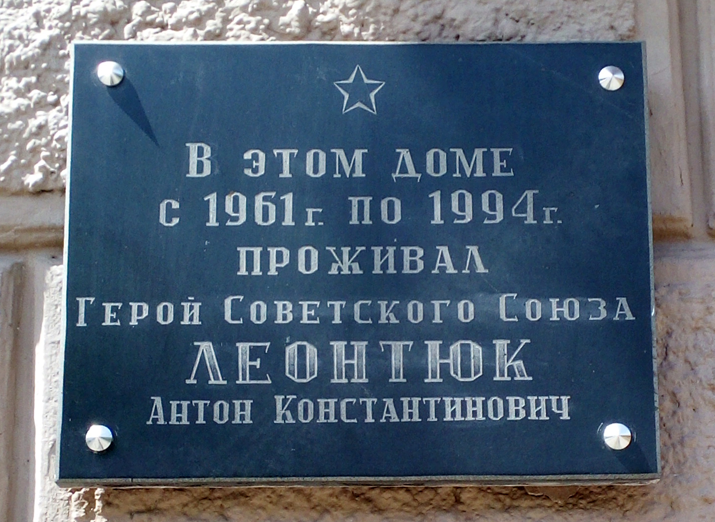 Житловий будинок (1952р.), проспект Карла Маркса, 19. Меморіальна дошка Герою Радянського Союзу Леонтюку А.К.